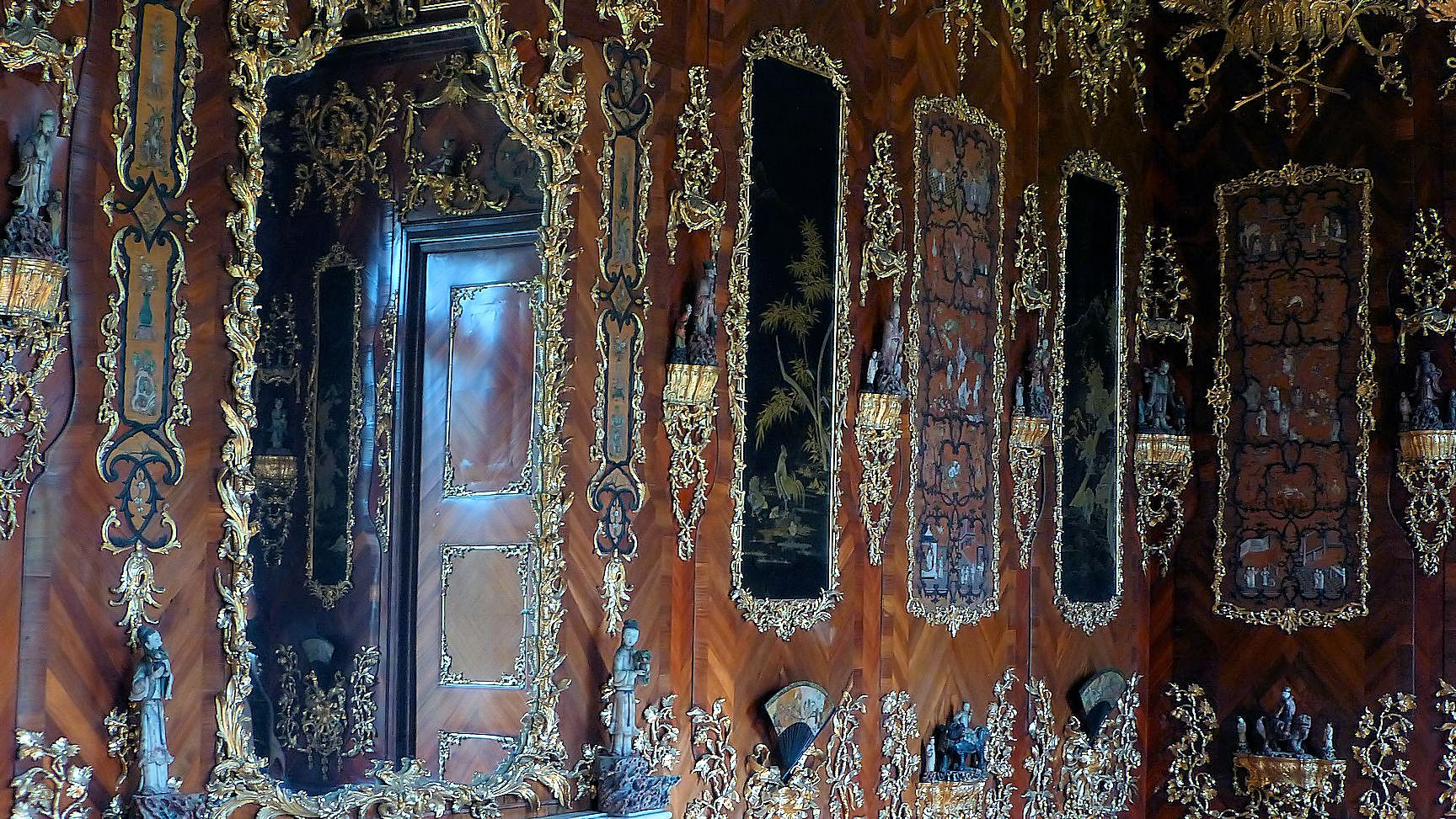 Schloss Hetzendorf - Festsaal und Chinesisches Zimmer Dieses Bild wurde anlässlich des österreichischen Tags des Denkmals 2012 in Wien eingereicht.